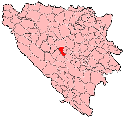 Prikaz općine Novi Travnik u Bosni i Hercegovini